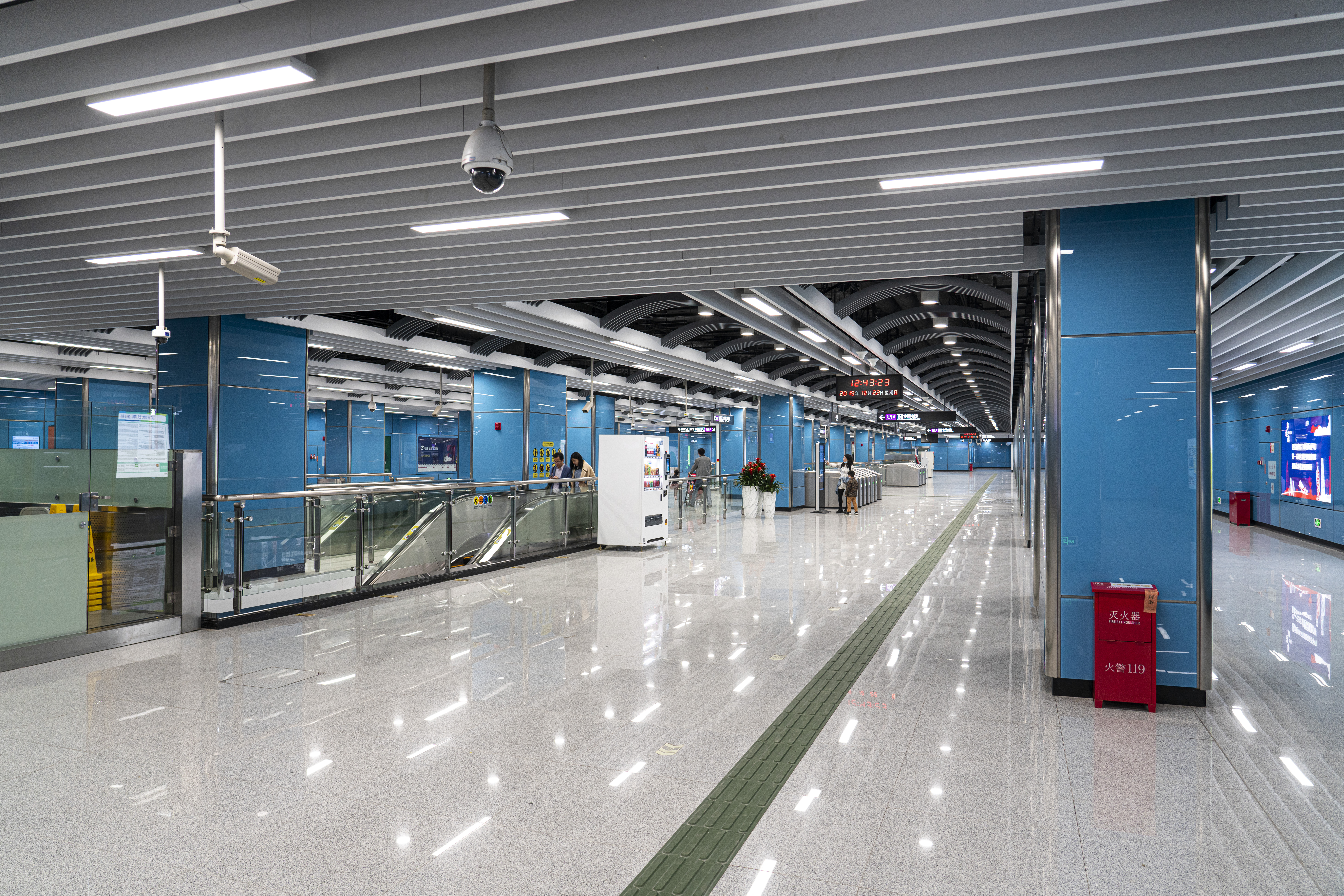 广州地铁水西站站厅